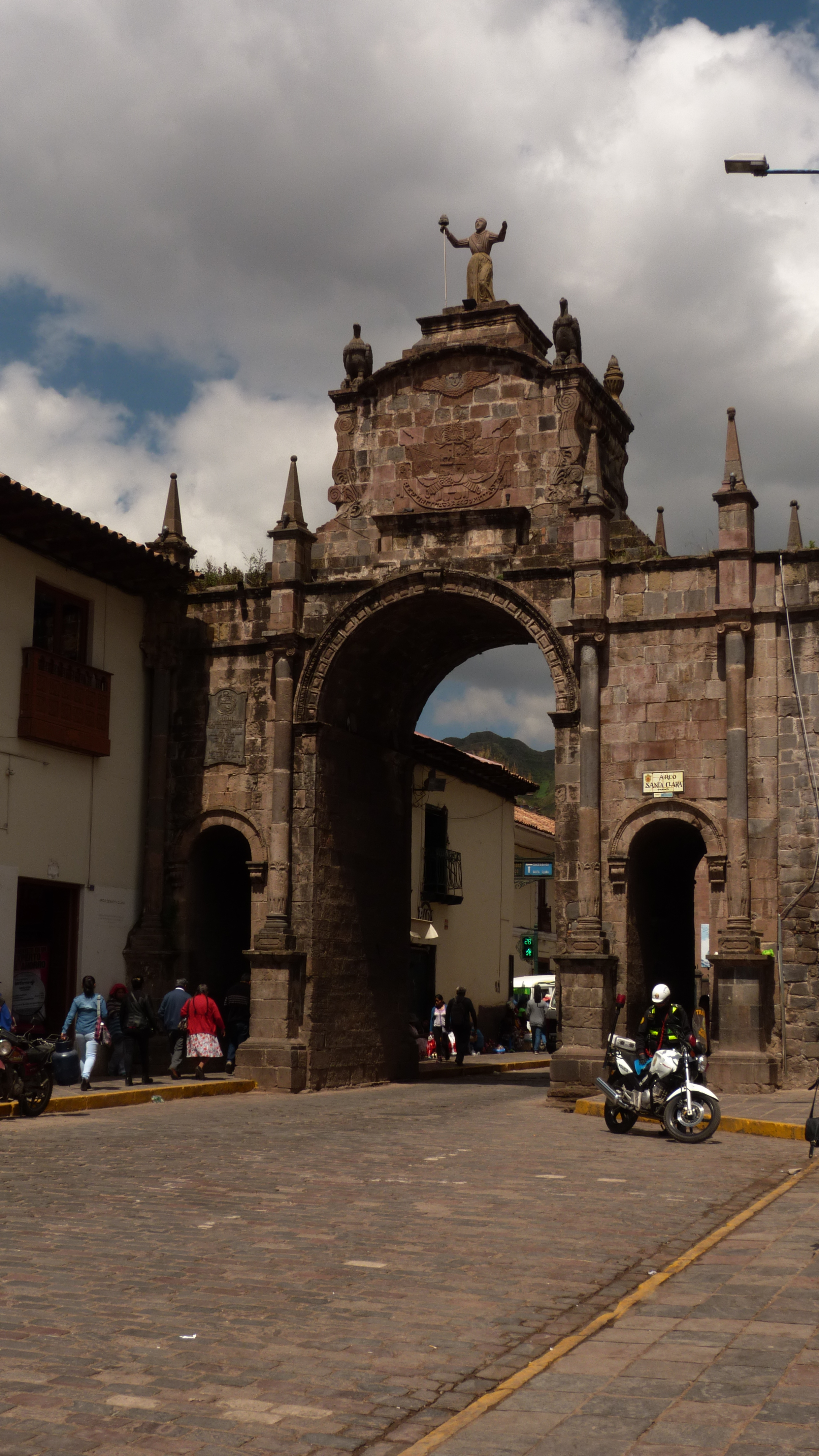 Interior del Monasterio San Pedro, en Cusco.